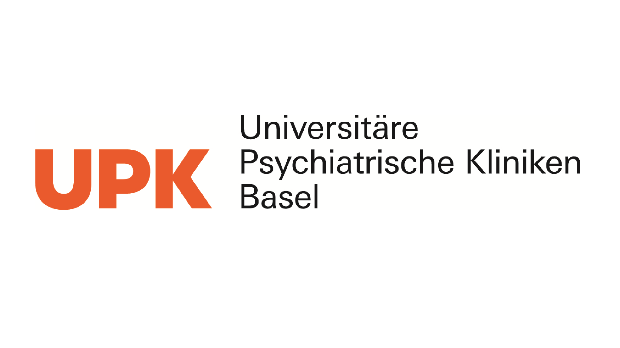 Logo der Universitären Psychiatrischen Kliniken (UPK) Basel, Schweiz